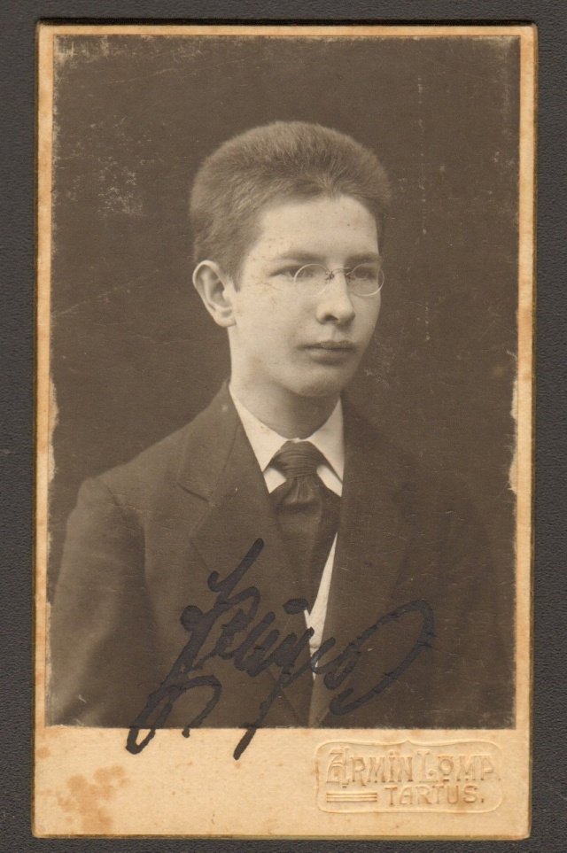 Mustvalge visiitkaartfoto, kleebitud papist alusele